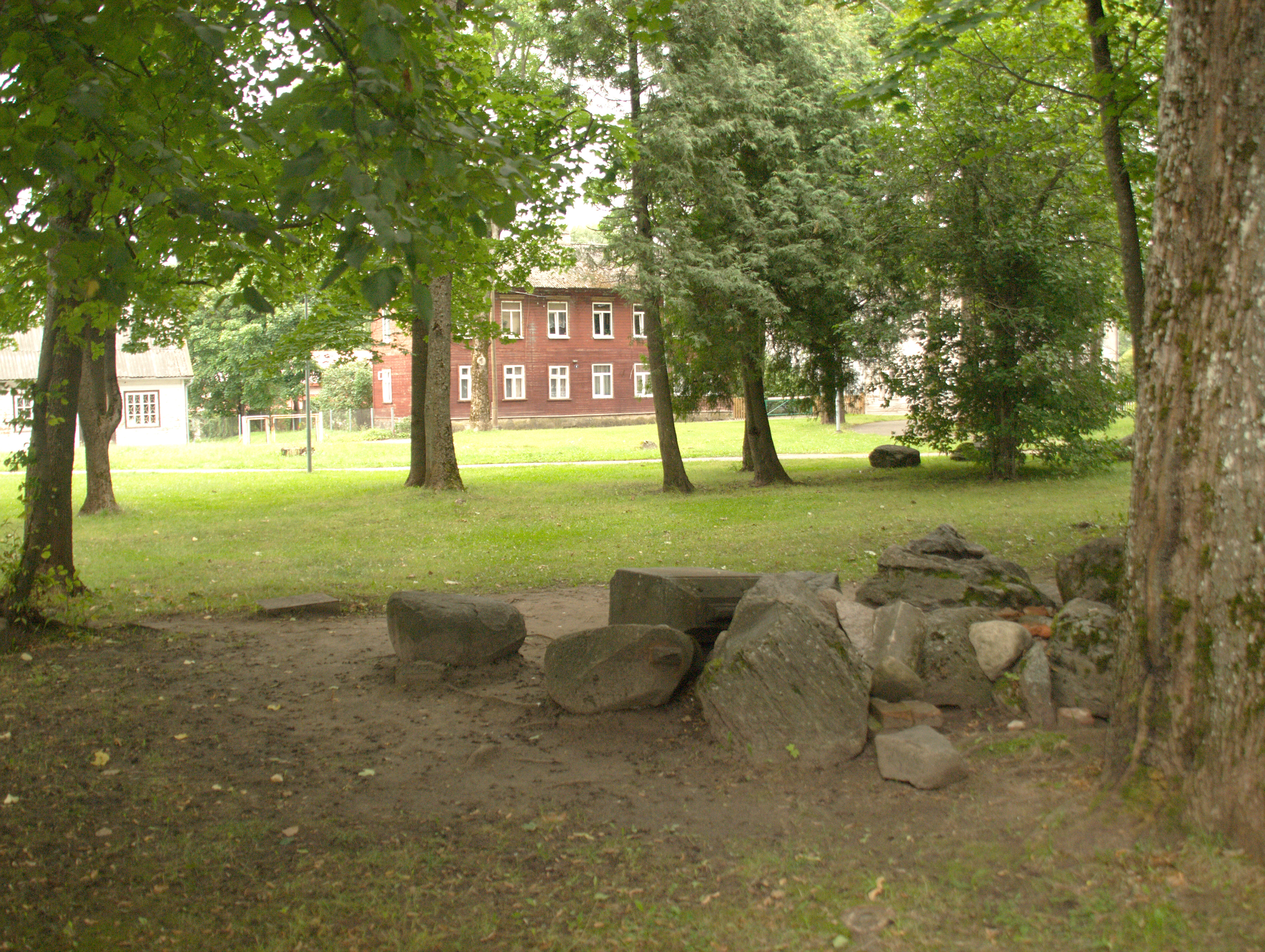 Valga vana linnakalmistu